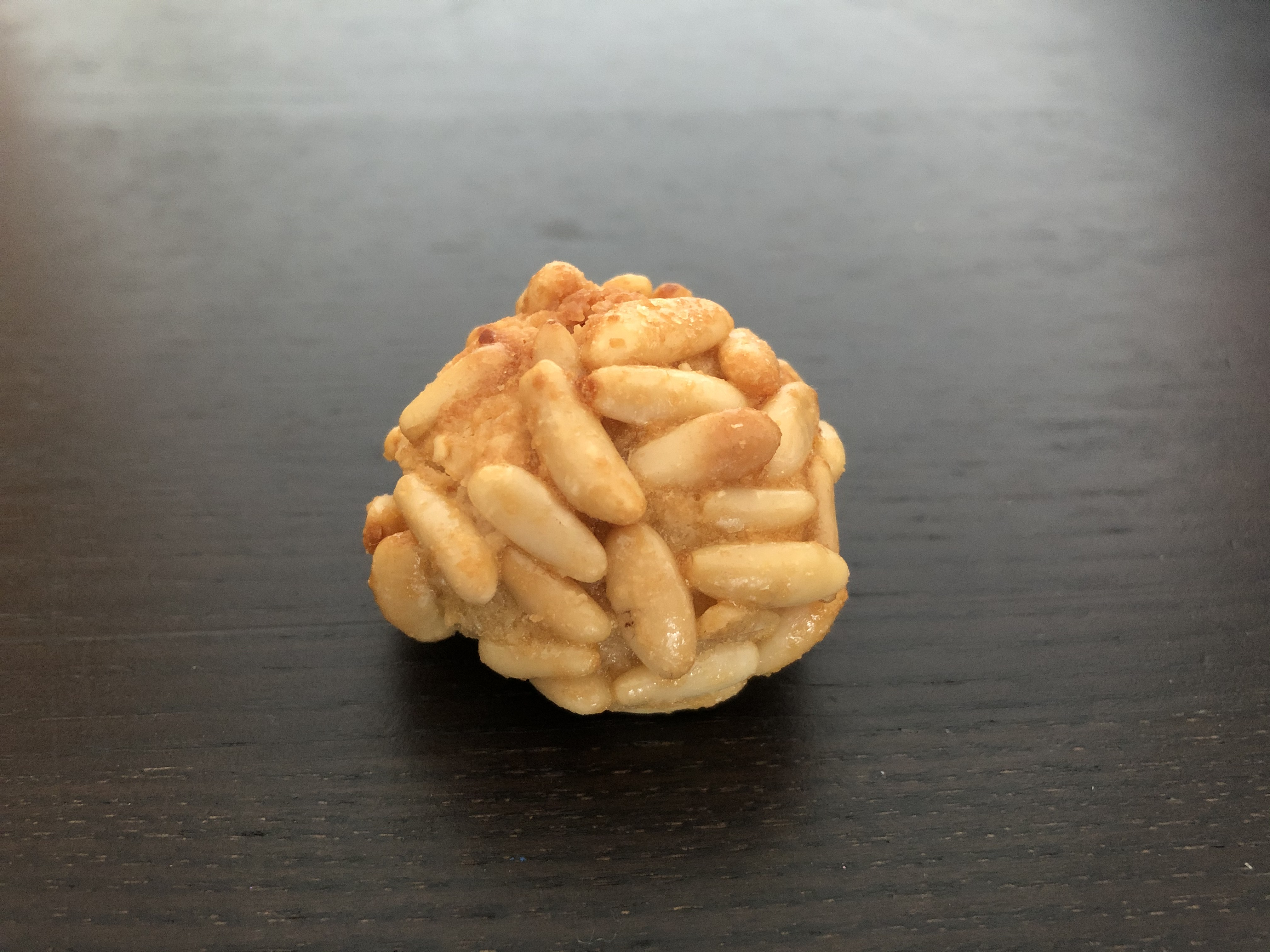 Panellet de pinyons del forn de la família Garcia, La Marina de Sants, Barcelona.